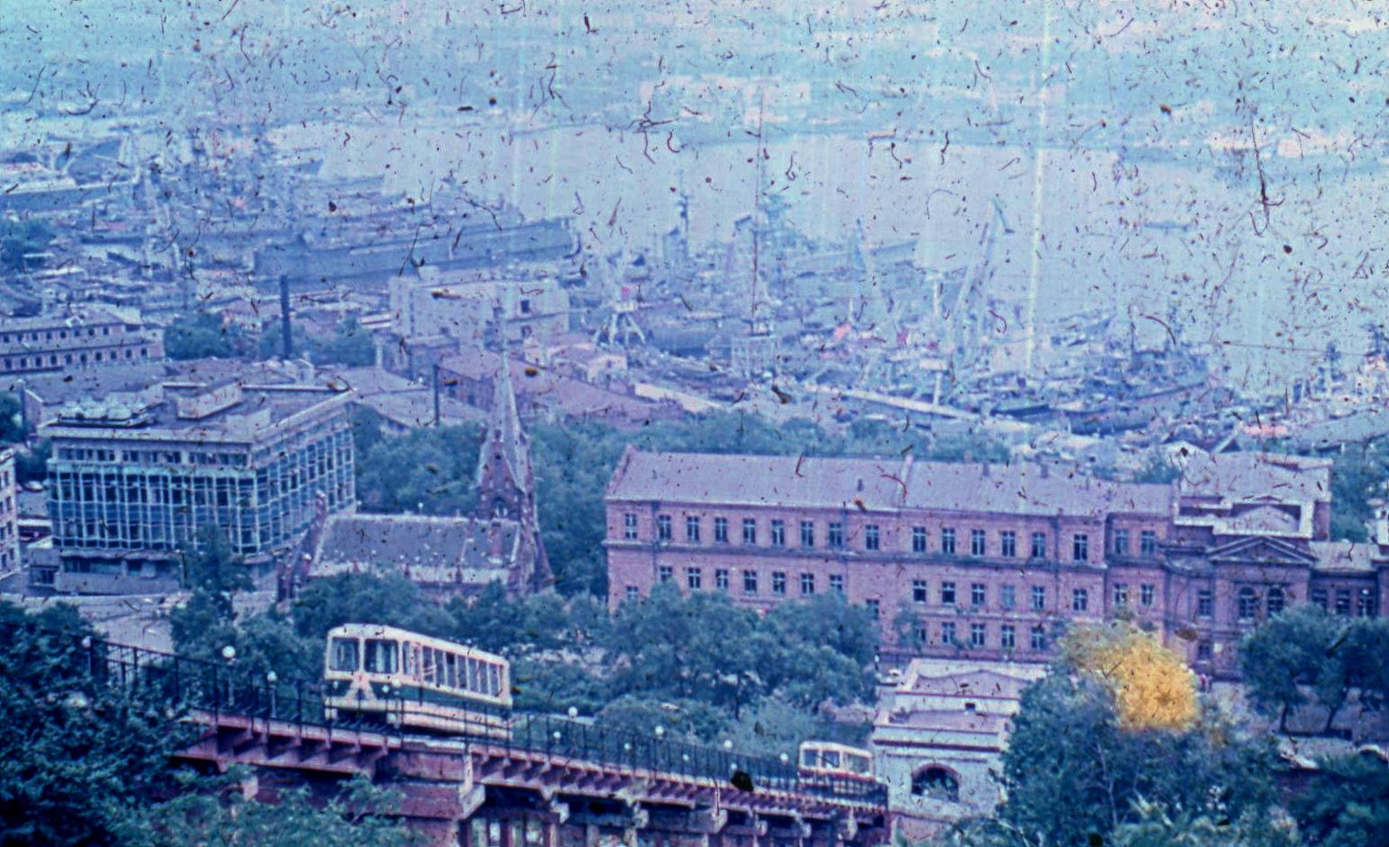 Владивостокский фуникулер в 1982 году